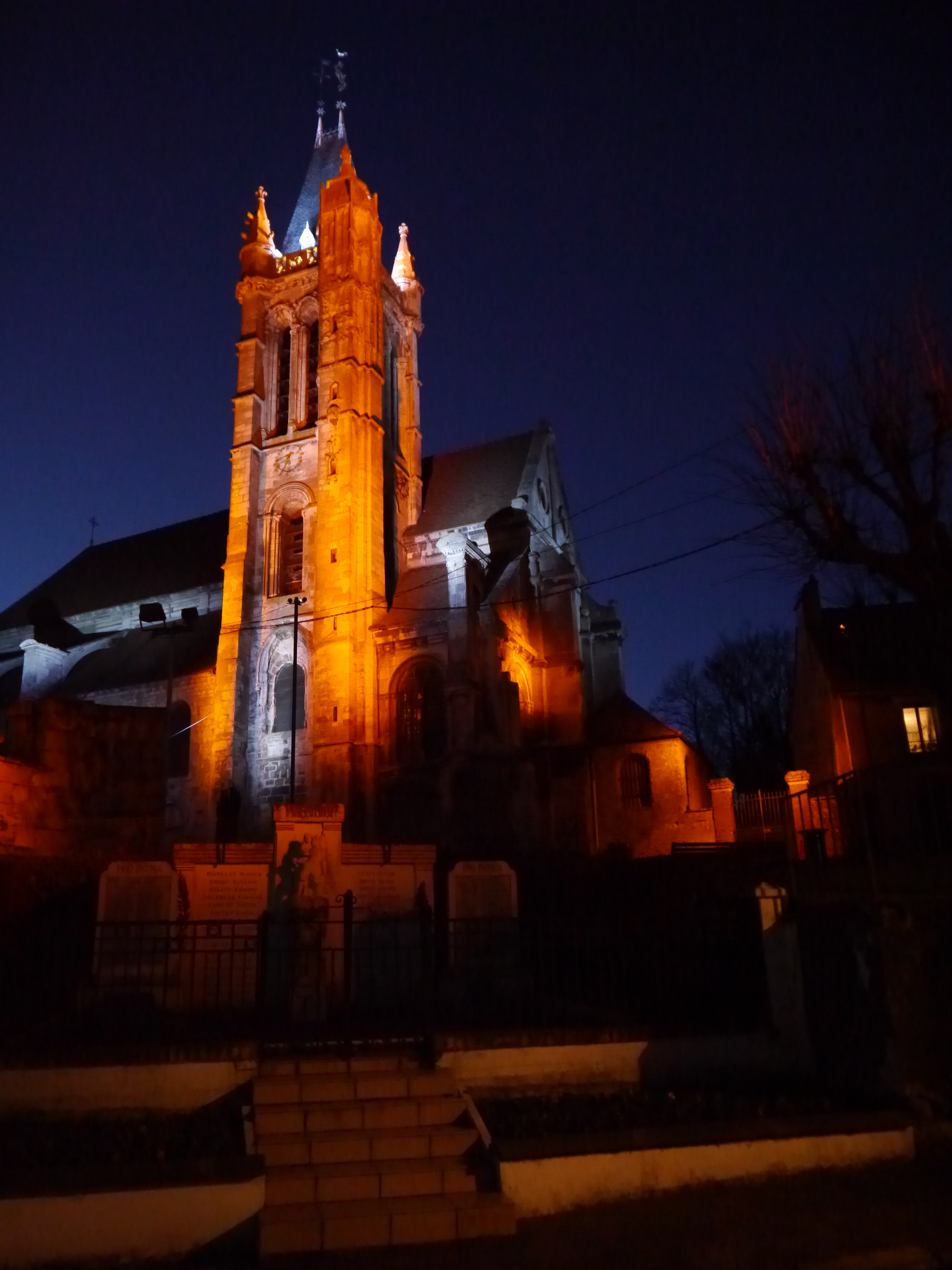 Église Saint-Pierre-Saint-Paul de Goussainville (Val d'Oise, France) - Vieux Pays